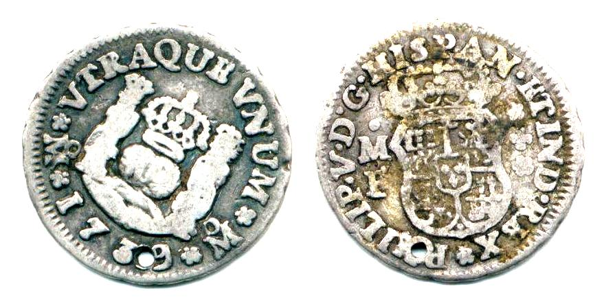 Medio real de México de 1739.